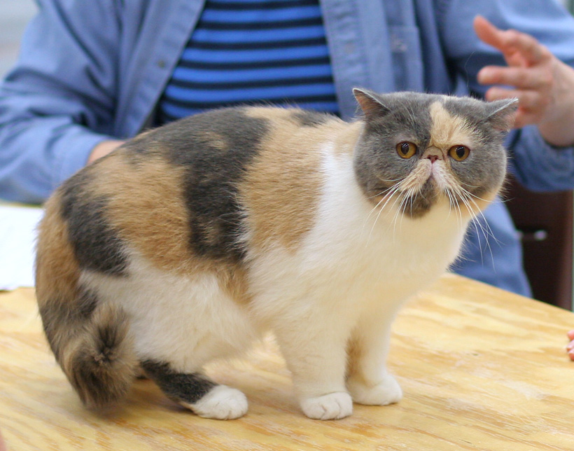 Nipsu-Nappulan Non-Sto, exotic shorthair femelle présentée en exposition féline à Kempele en 2007. Code EMS Nipsu-Nappulan Non-Stop [EXO g 03] female EX1 CAPIB